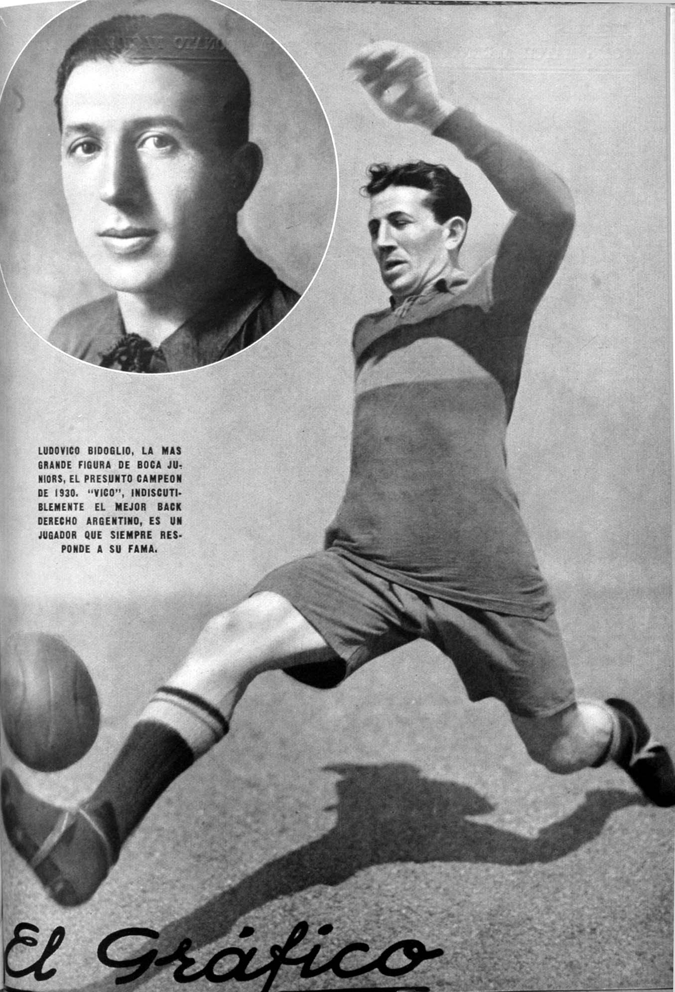 El Grafico del 25 de Octubre de 1930. Edicion 589